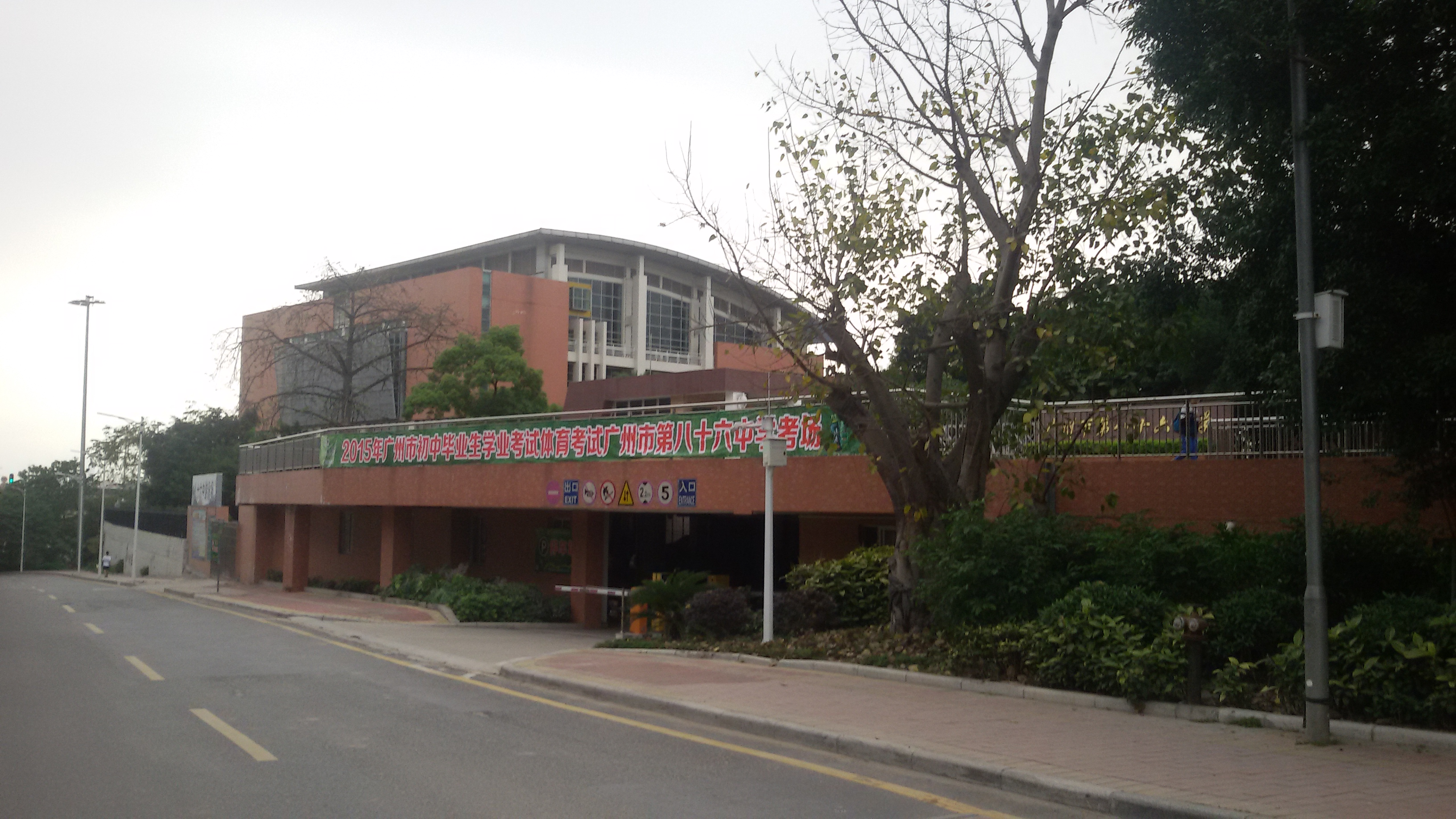 粵語: 廣州市第八十六中學嘅高中部附近